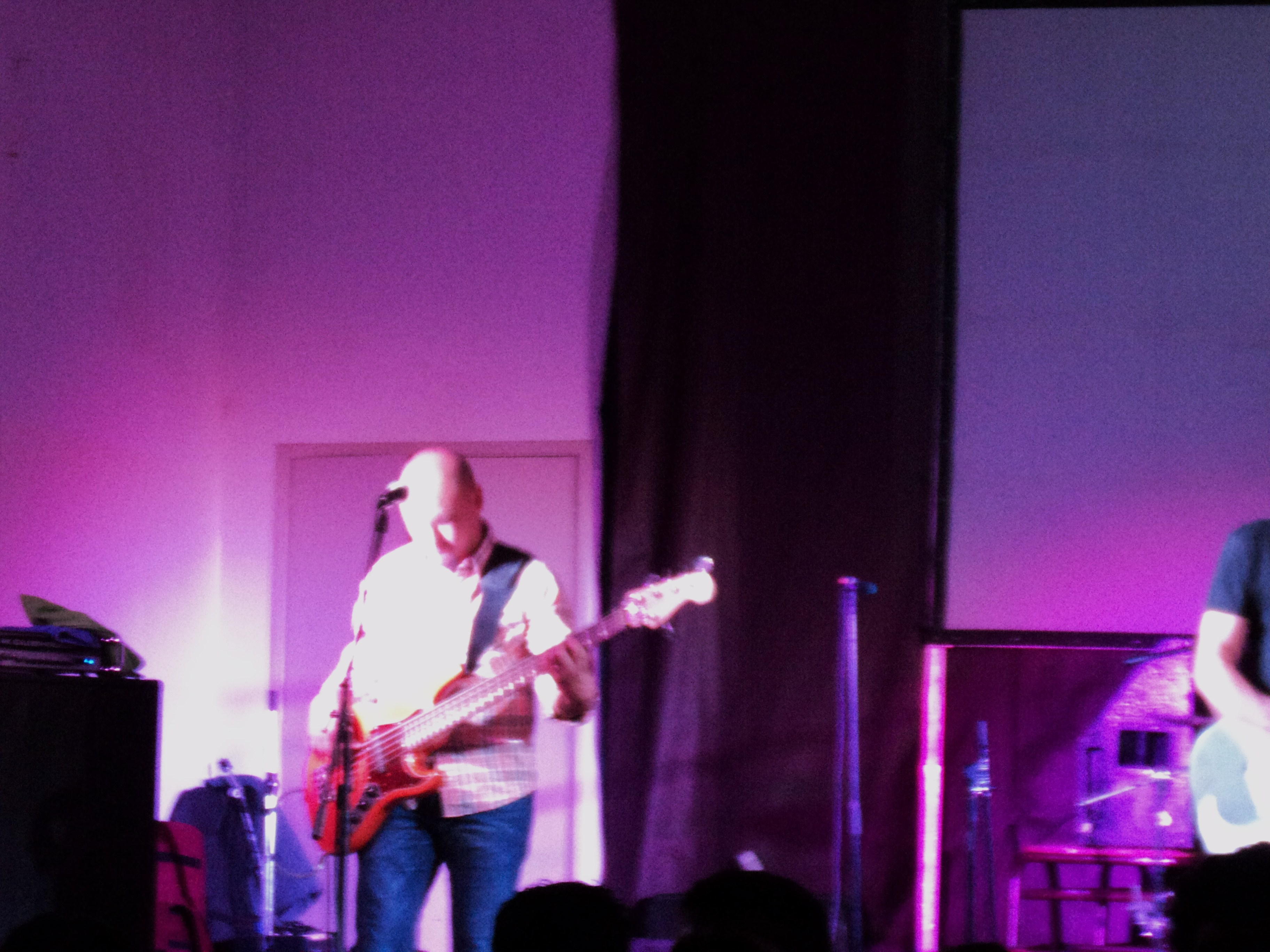 el bajista de rescate en pleno recital de la bnada